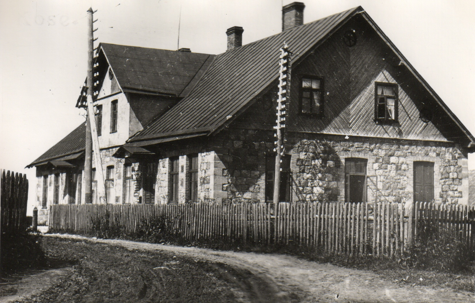 Kose Laenu- ja Hoiuühisuse hoone. Tänane postkontor